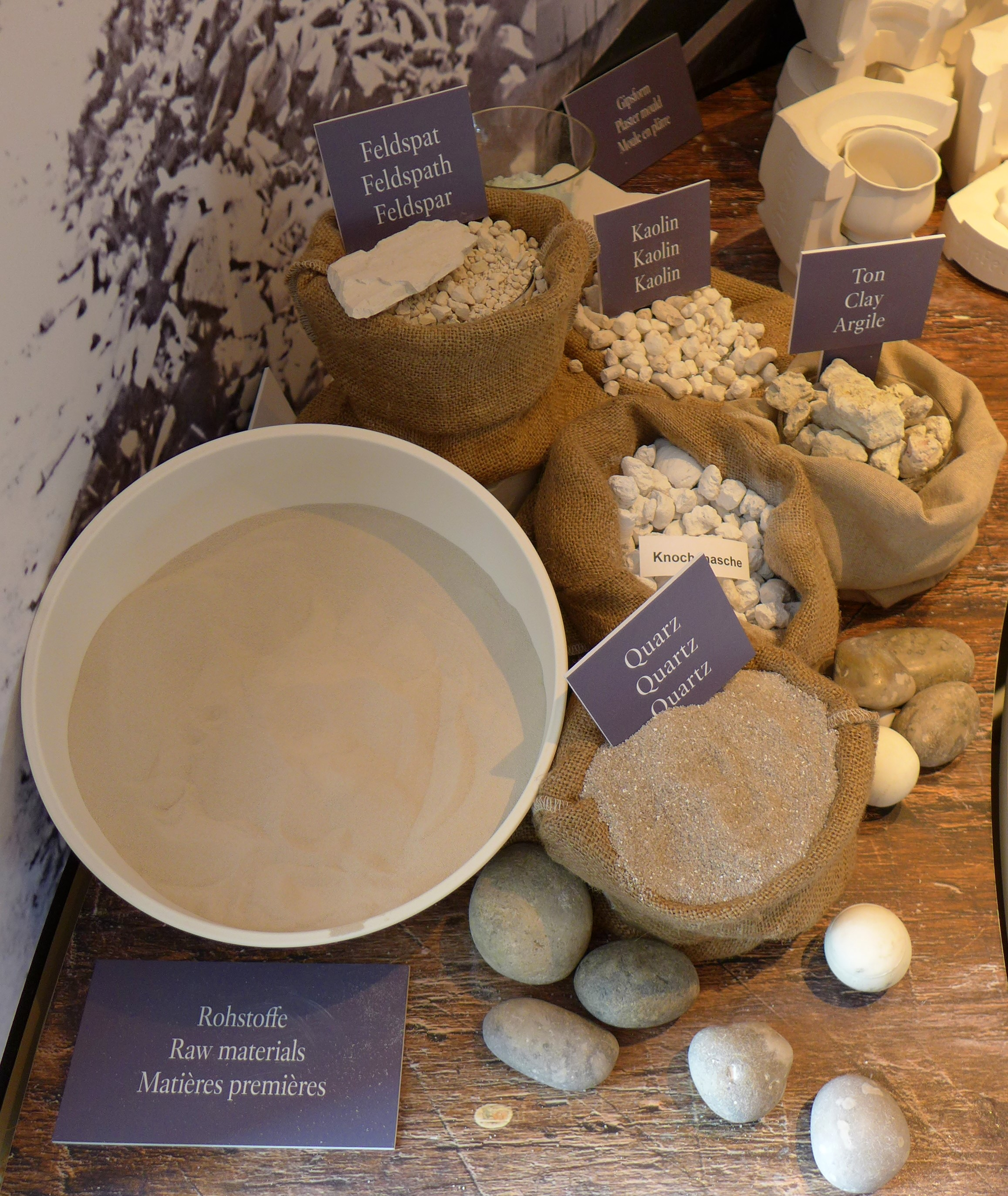 Porzellanzutaten